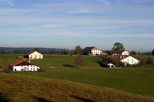 Typische Bauernhäuser des Juras in den Franches-Montagnes: Les Terres-Rouges bei Le Bémont